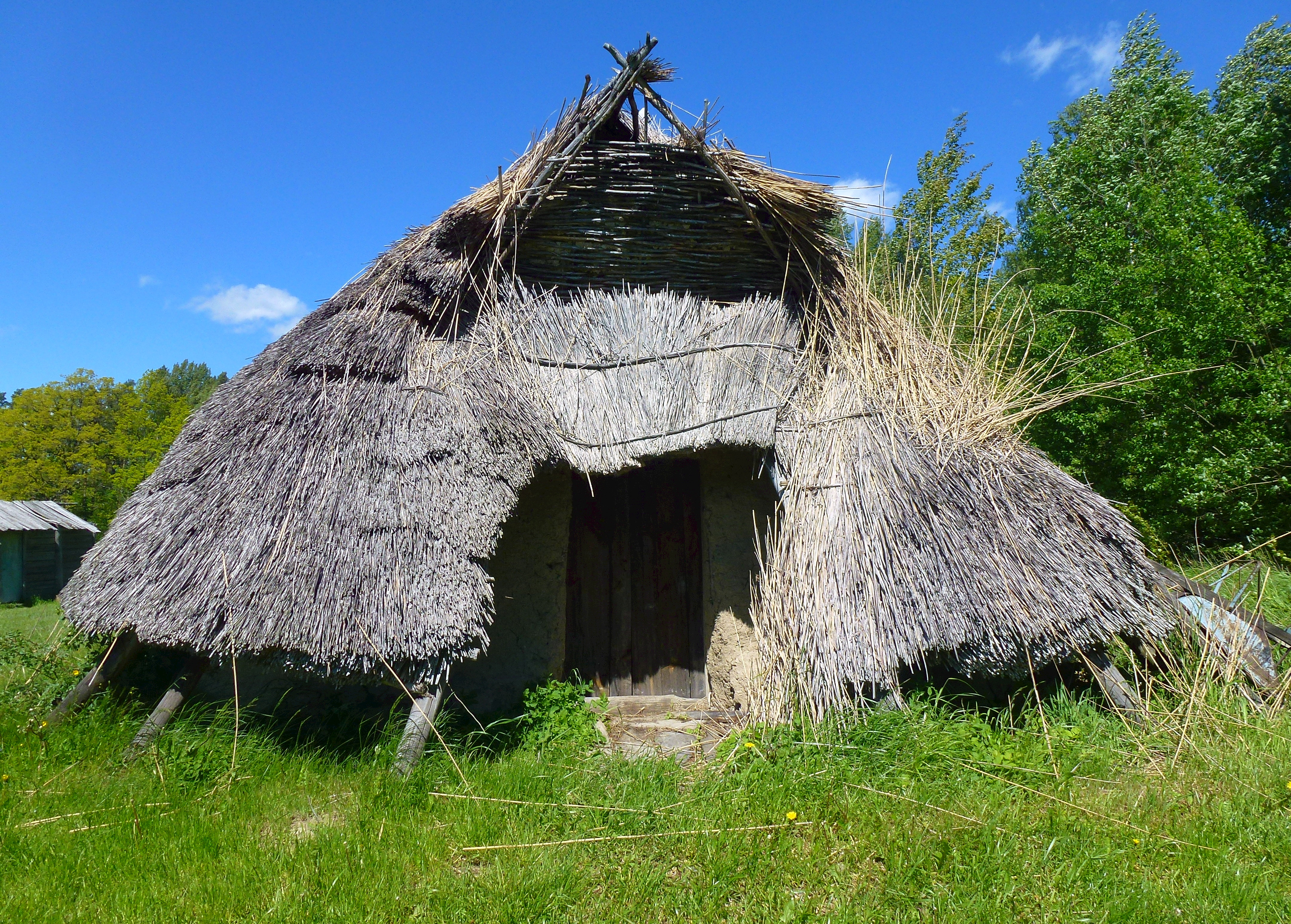 Järnåldershuset Körunda i Nynäshamnskommun